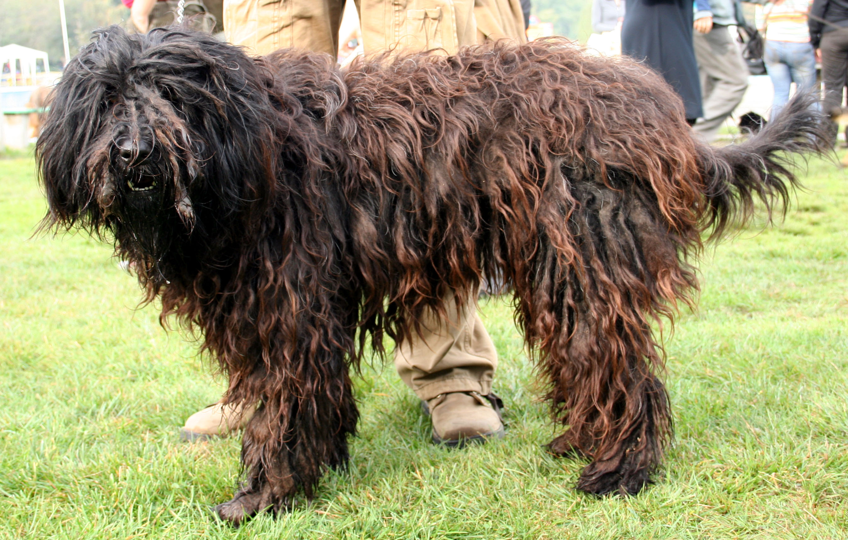 Bergamasco